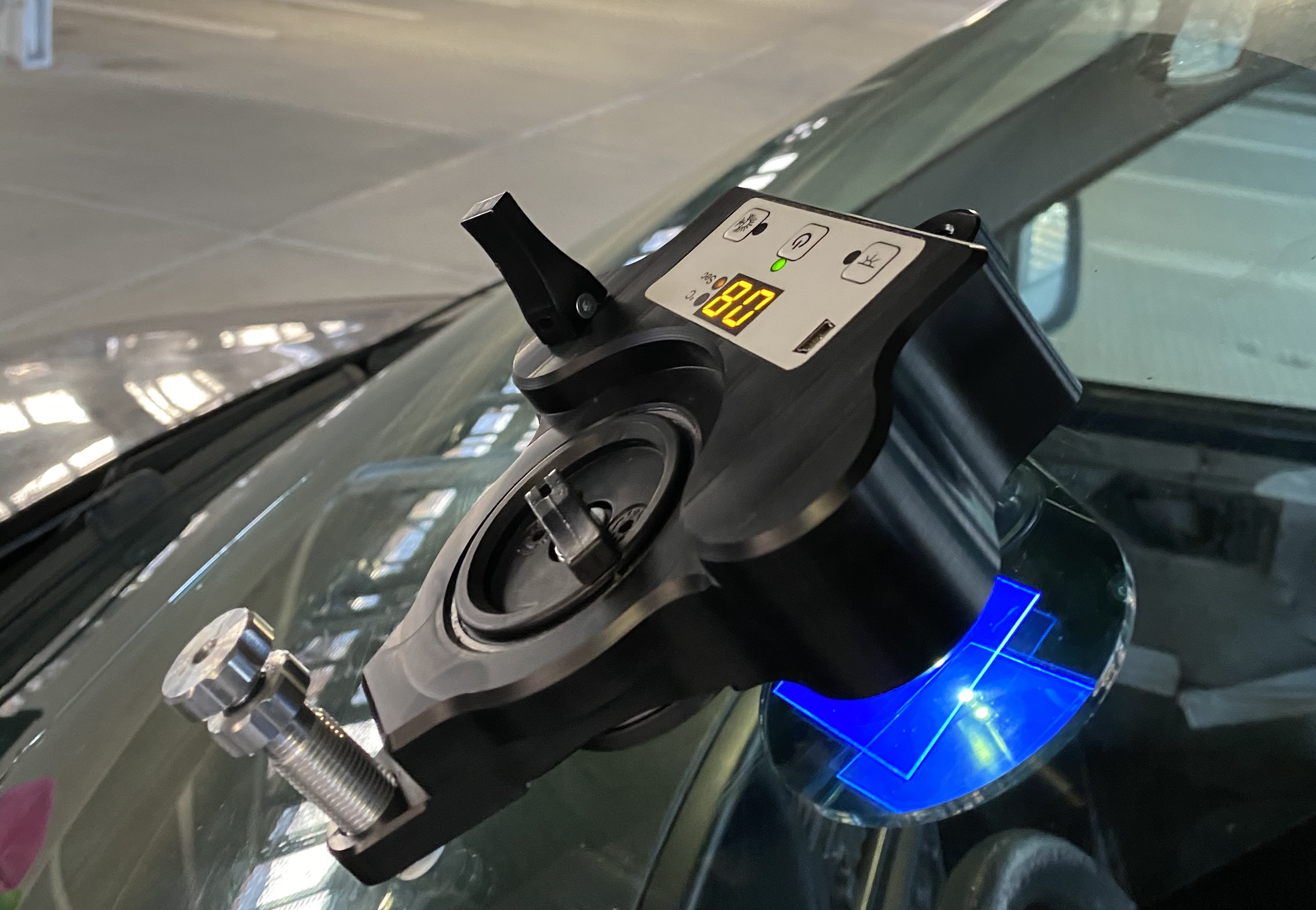 Stenslagsværktøj til reparation af stenslag i forruder via tryk og vacuum